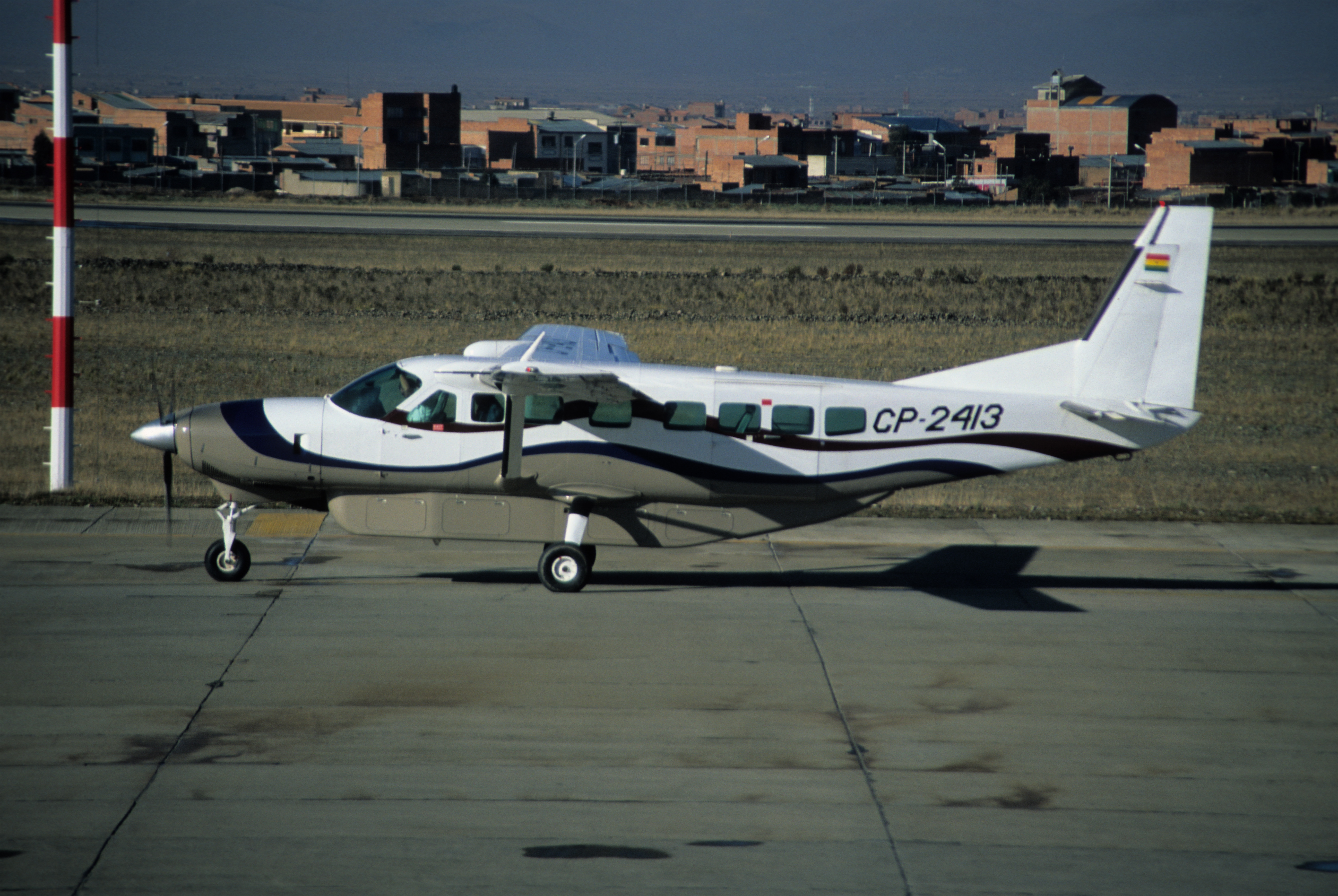 325ah - AMASZONAS Cessna 208B; CP-2413@LPB;02.10.2004